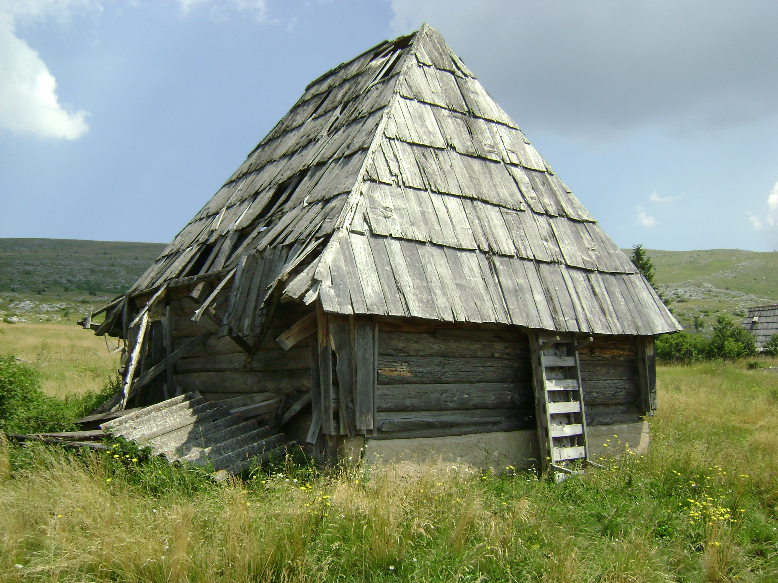 pojata injac obrada